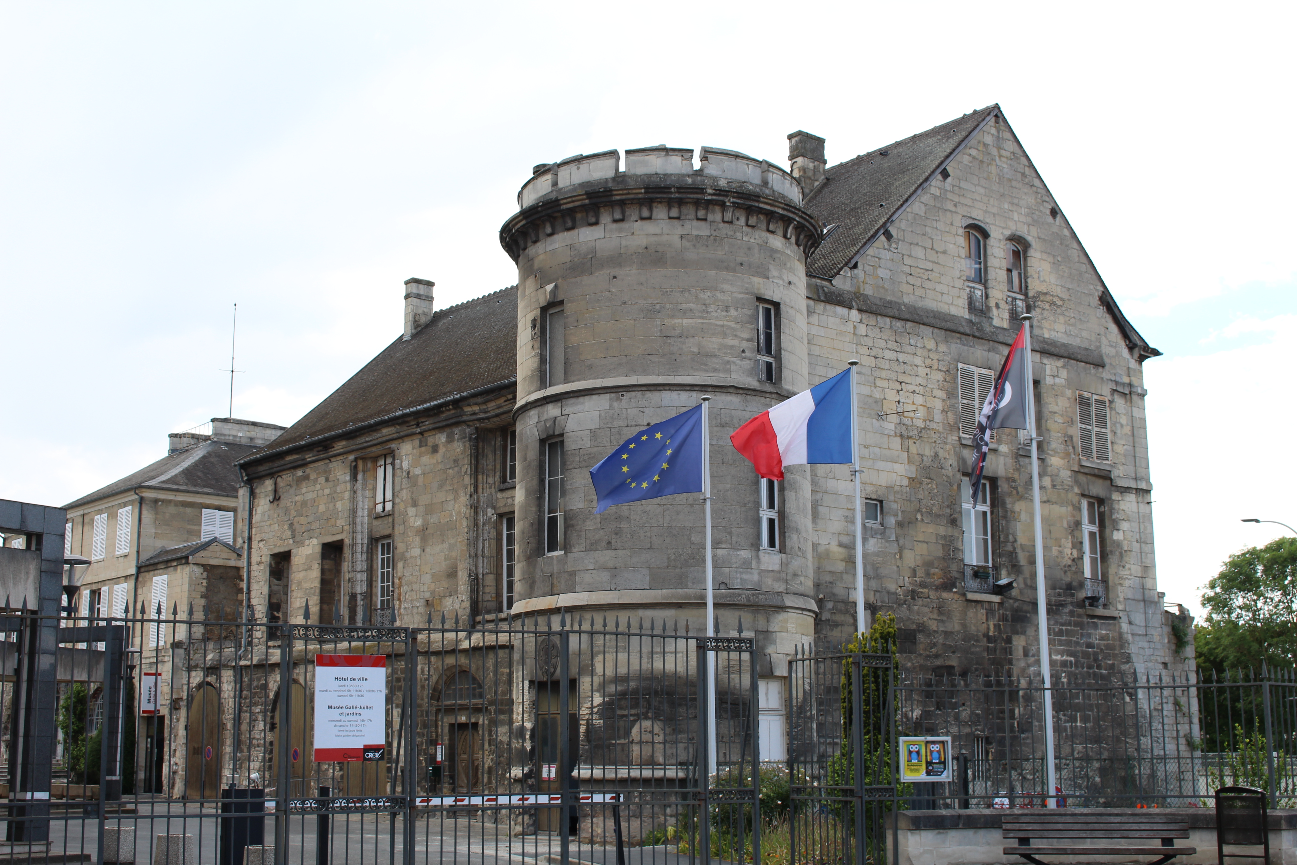 Château de Creil.